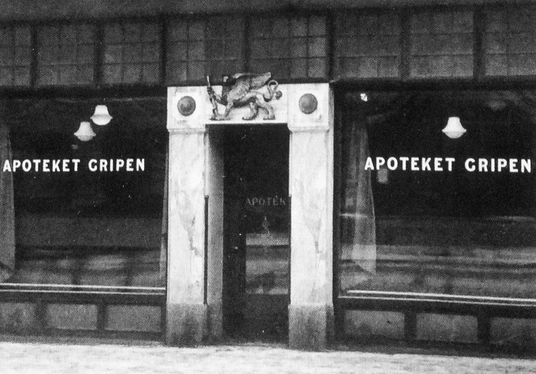 Apoteket Gripens entré från Götgatan 57